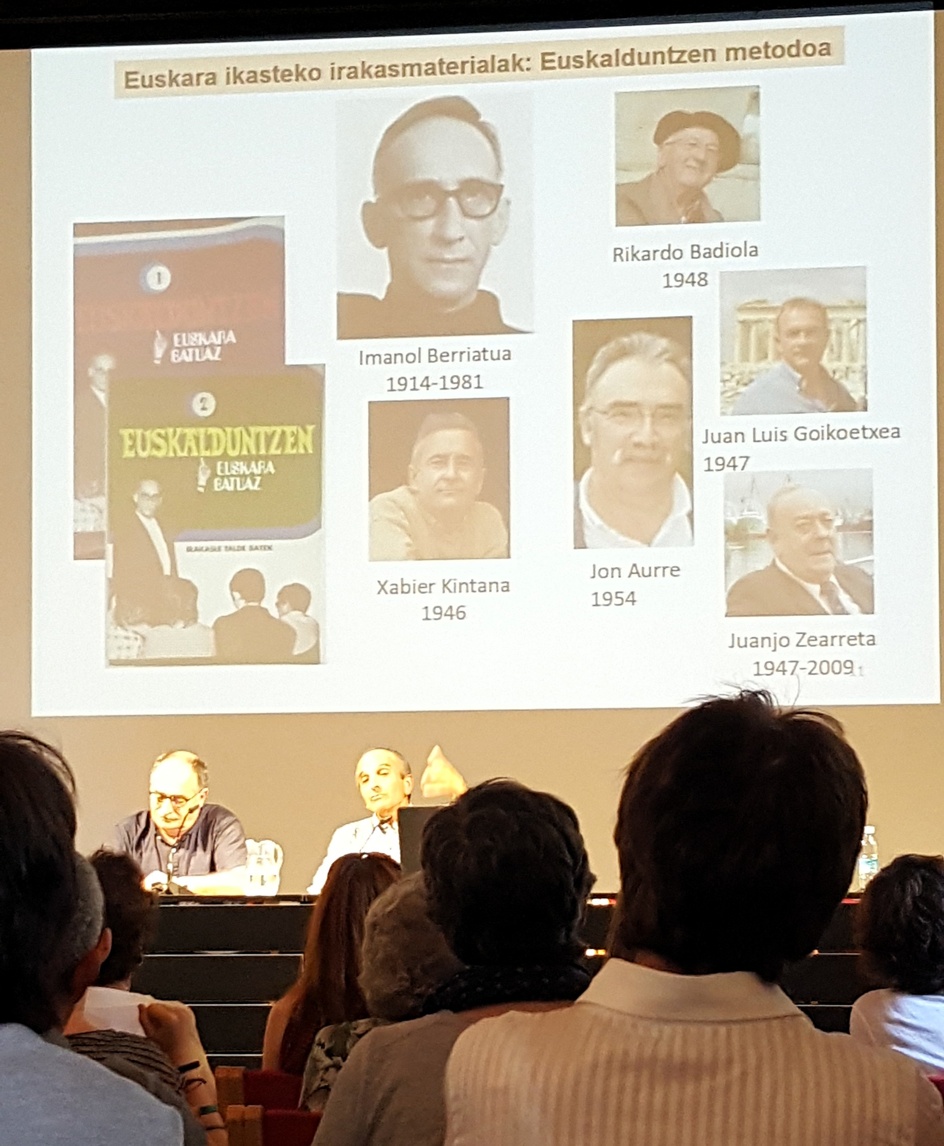 Euskara ikasteko Euskalduntzen metodoa. Euskara Batuaren helduaroa Jardunaldiaren barruan (Gasteiz, 2018-06-21). Jose Ramon Etxebarriak bere hitzaldian euskarazko testugintzan bere helburuak, lanak eta bidelagunak aipatu zituen (Euskarazko testugintza. Amaitu gabeko historiaren atal baten bertsio pertsonala).